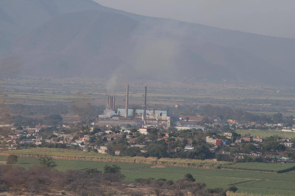 Desde las alturas. Atencingo.